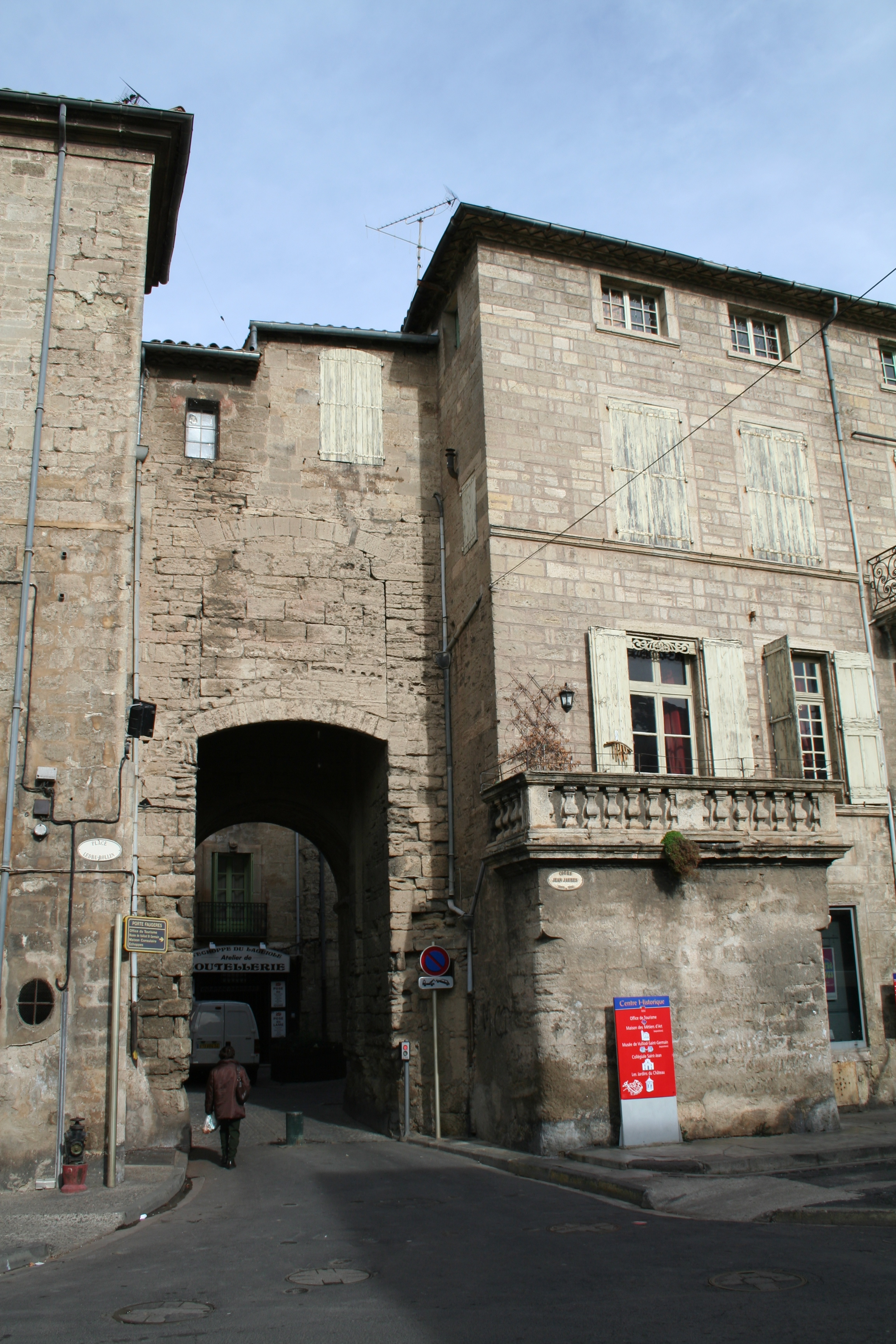 Pézenas (Hérault) - Porte de Faugères.